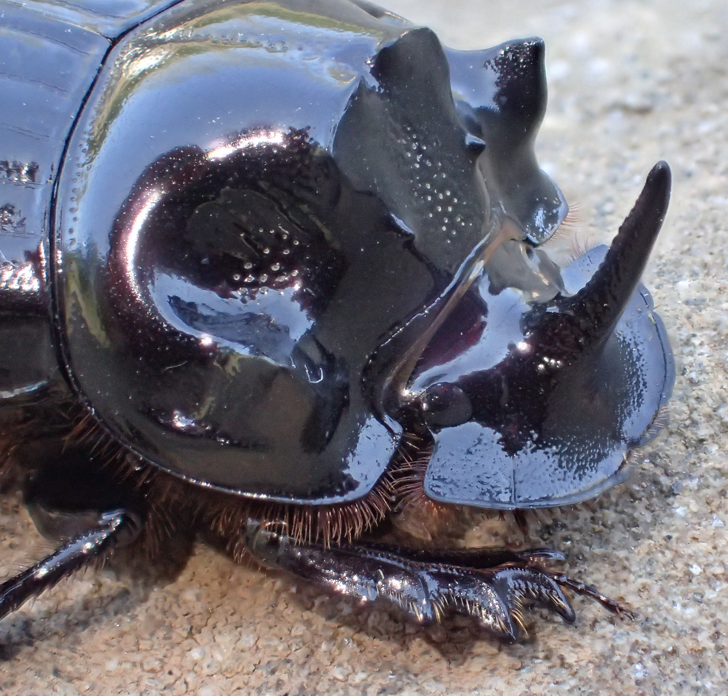 Copris lunaris Männchen, Teilansicht, aus Griechenland, Epirus, nordwestlich von Ioannina, 783 m hoch